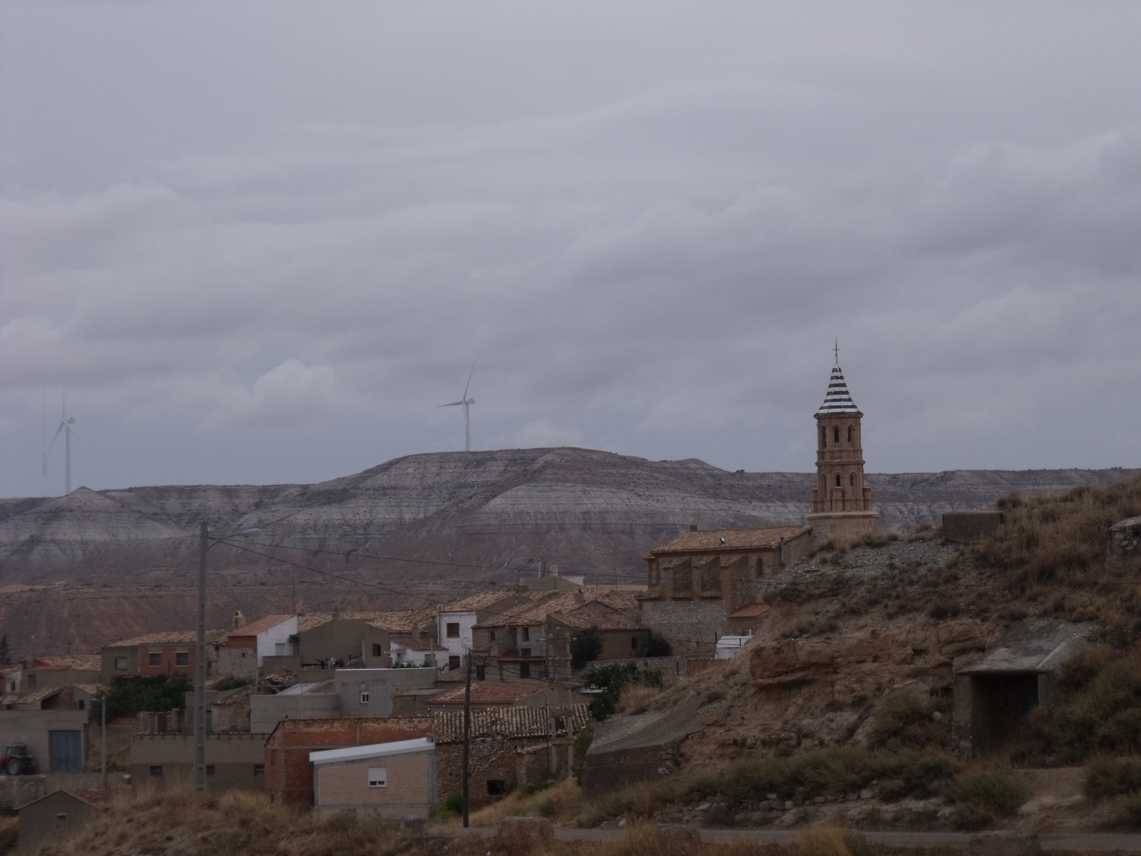 Vista general del pueblo